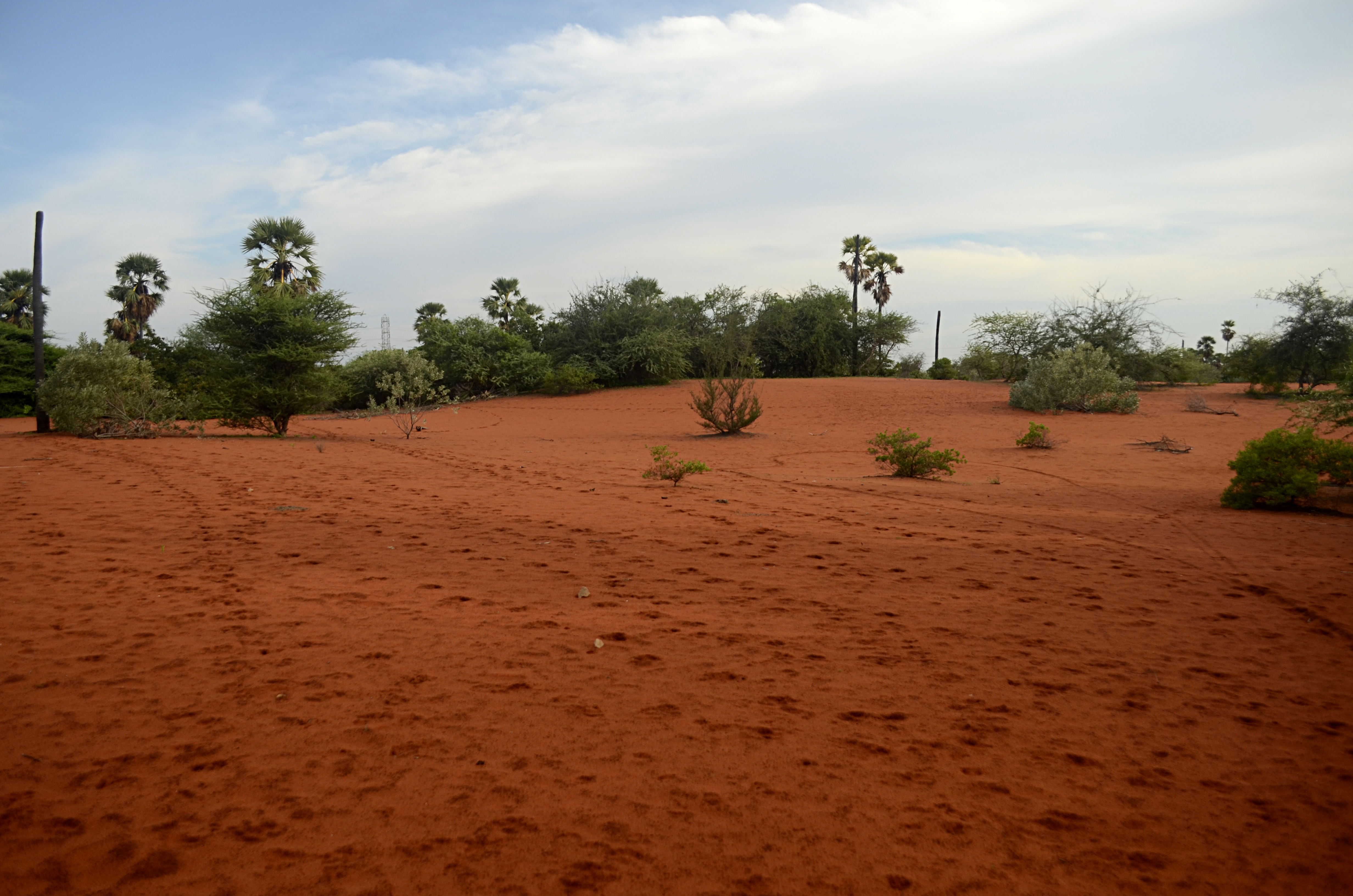 Habitat in Teri red dune complex